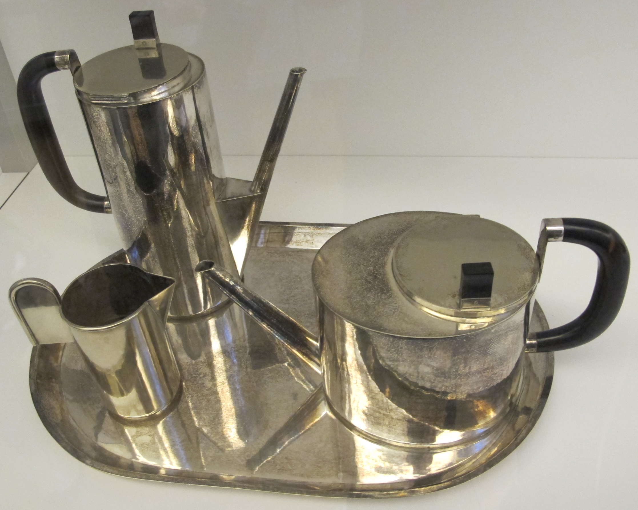 Wilhelm wagenfeld, servizio per caffè-tè, 1924